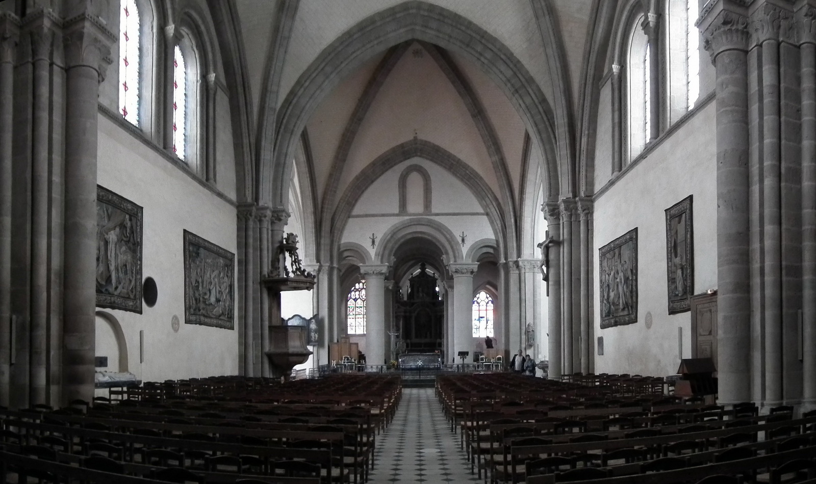 Cathédrale de la Trinité, Laval, France